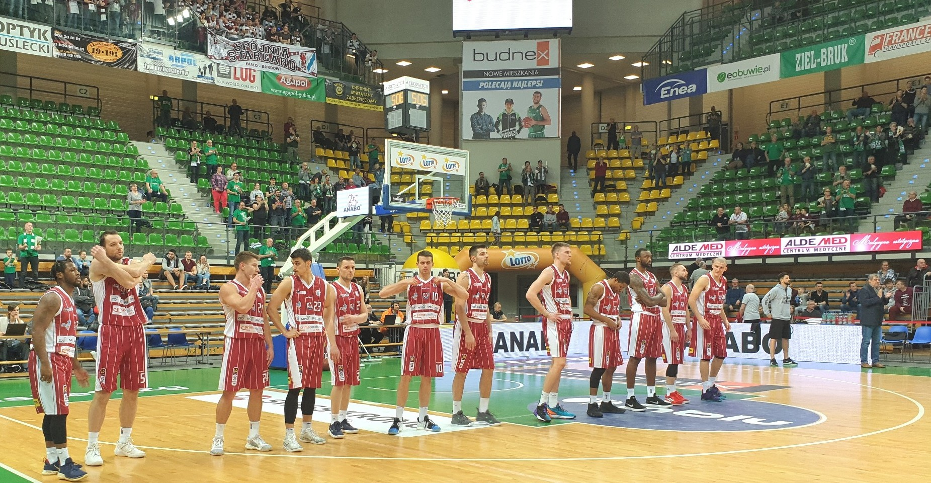 Spójnia Zielona Góra